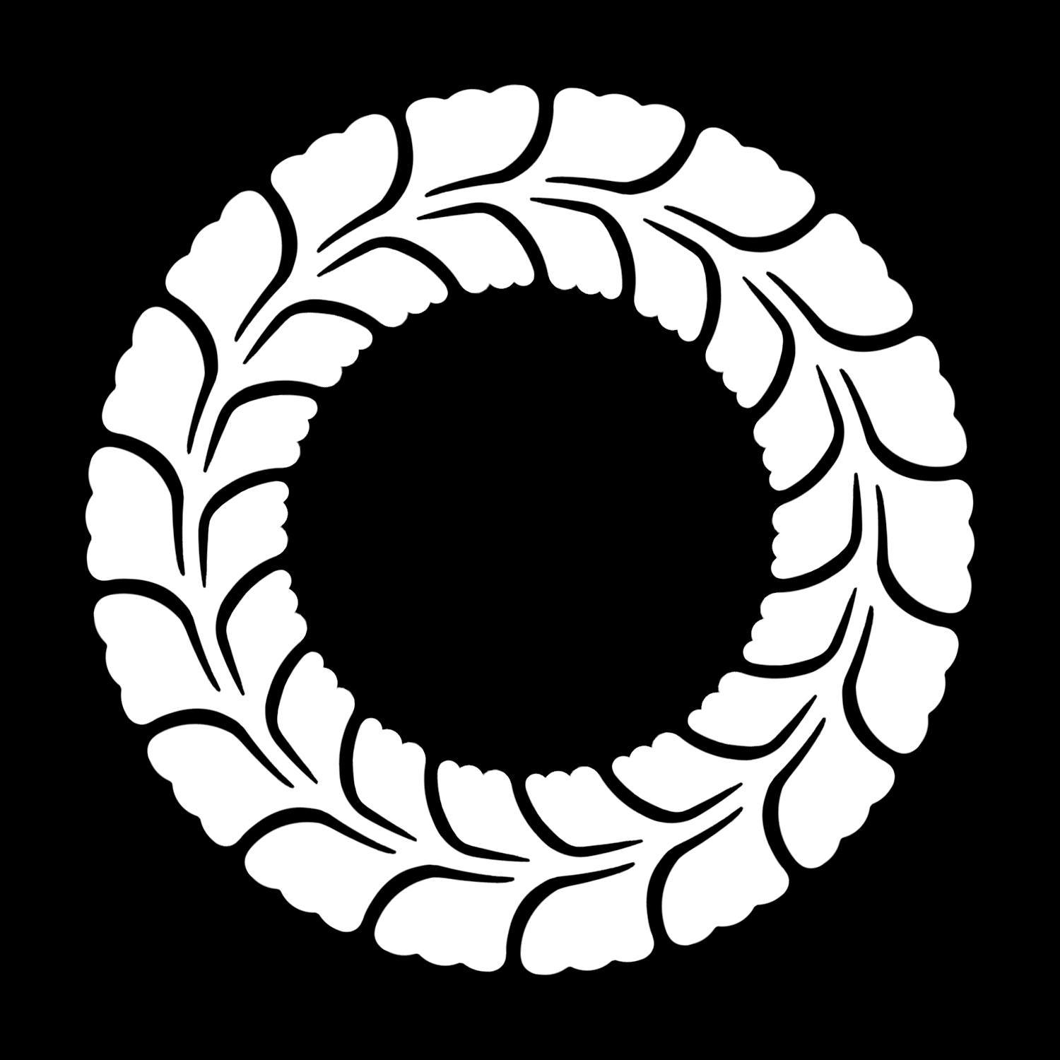 「藤の丸」紋（染抜）